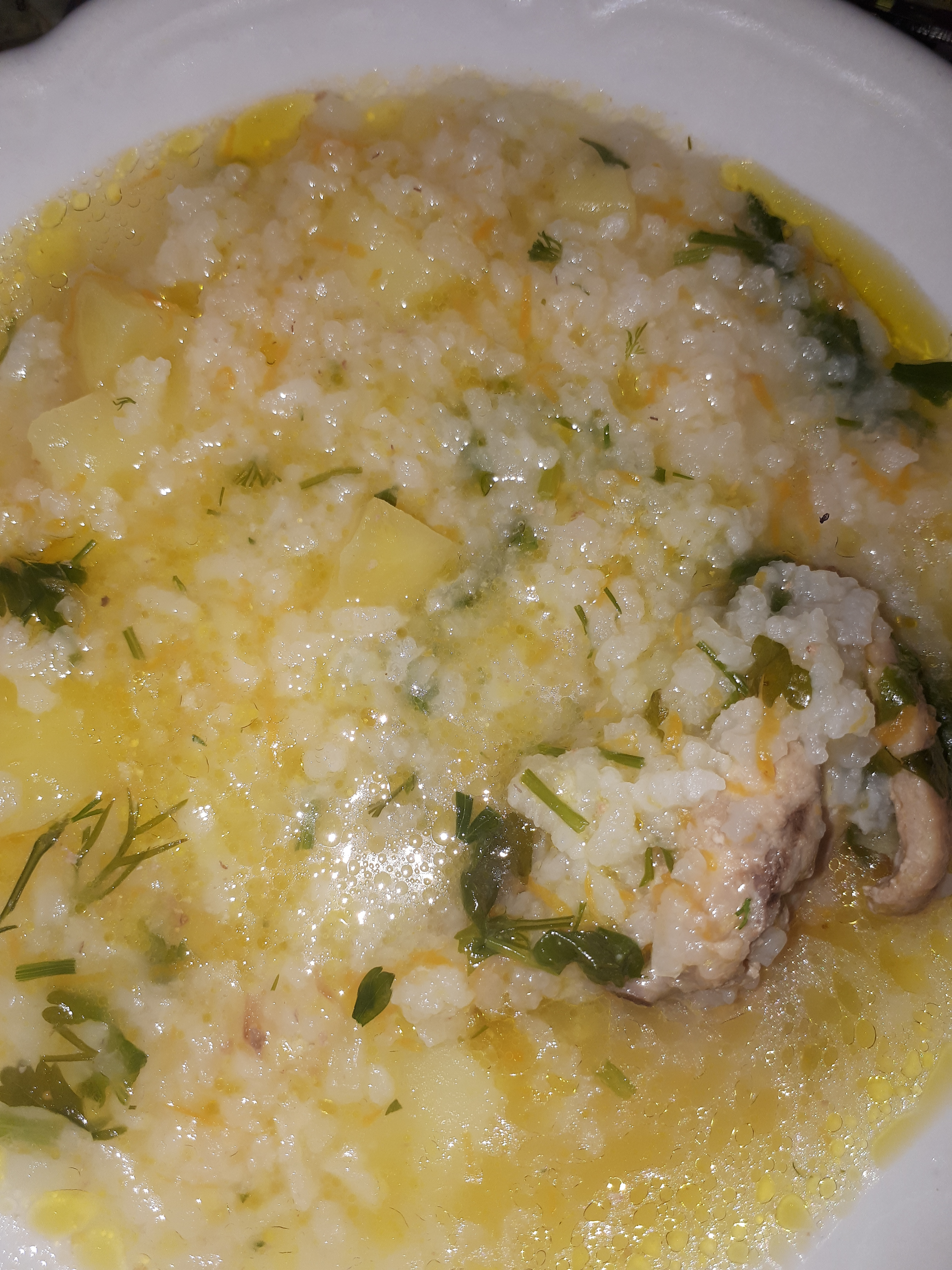 Суп из бульона